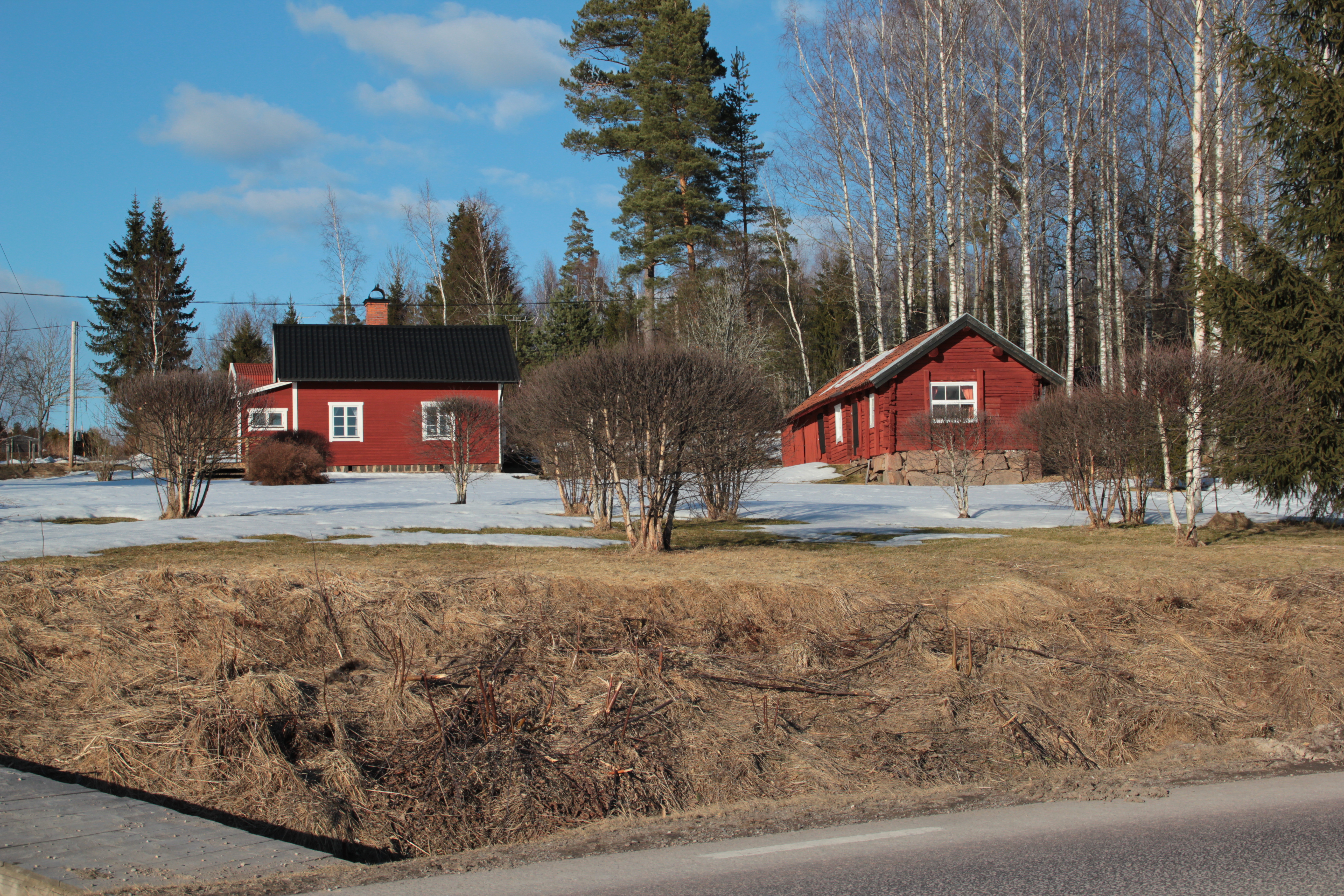 Del av Hönsgärdet, Norbergs kommun, Sverige, sett från Länsväg 256.